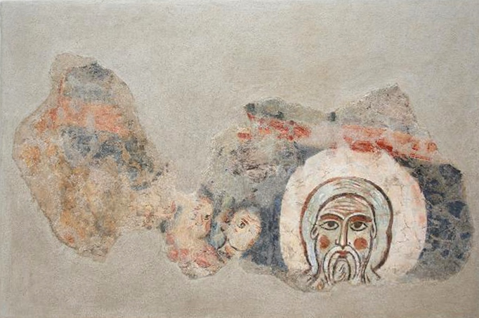 Lacerto di affresco con Abramo e gli eletti (da un più ampio Giudizio universale andato perduto) di artista ignoto della prima metà del XII secolo, proveniente dall'ex chiesa di Santa Lucia in Gaeta.